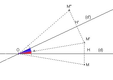 Composée de deux réflexions d'axes sécants Image personnelle Licence GFDL HB